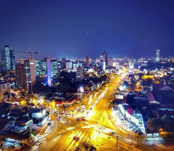 Santa Cruz de la Sierra de noche